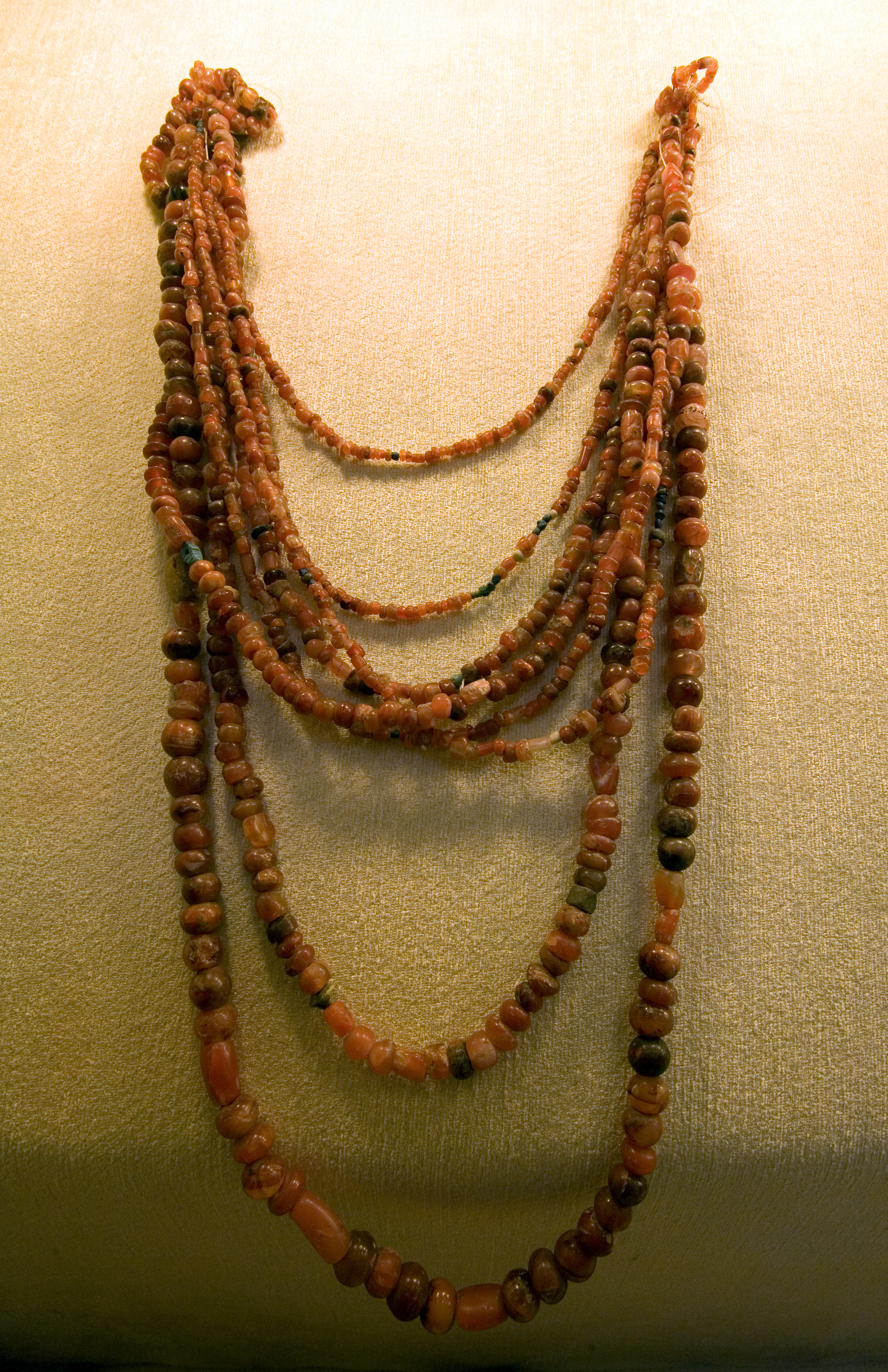 Urartian Necklace